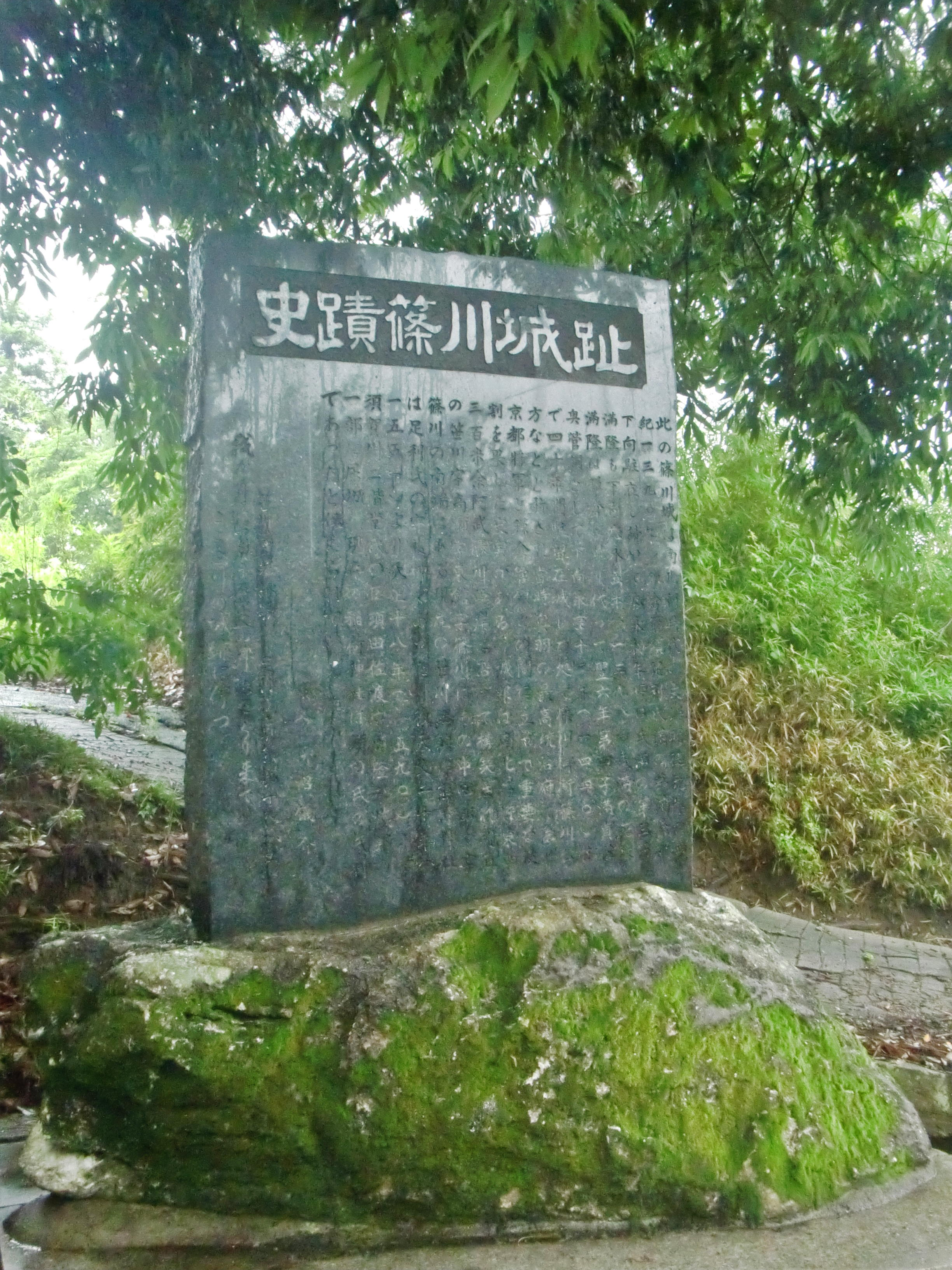 福島県郡山市安積町笹川 篠川城址(佐々河城、篠川館、篠川御所)